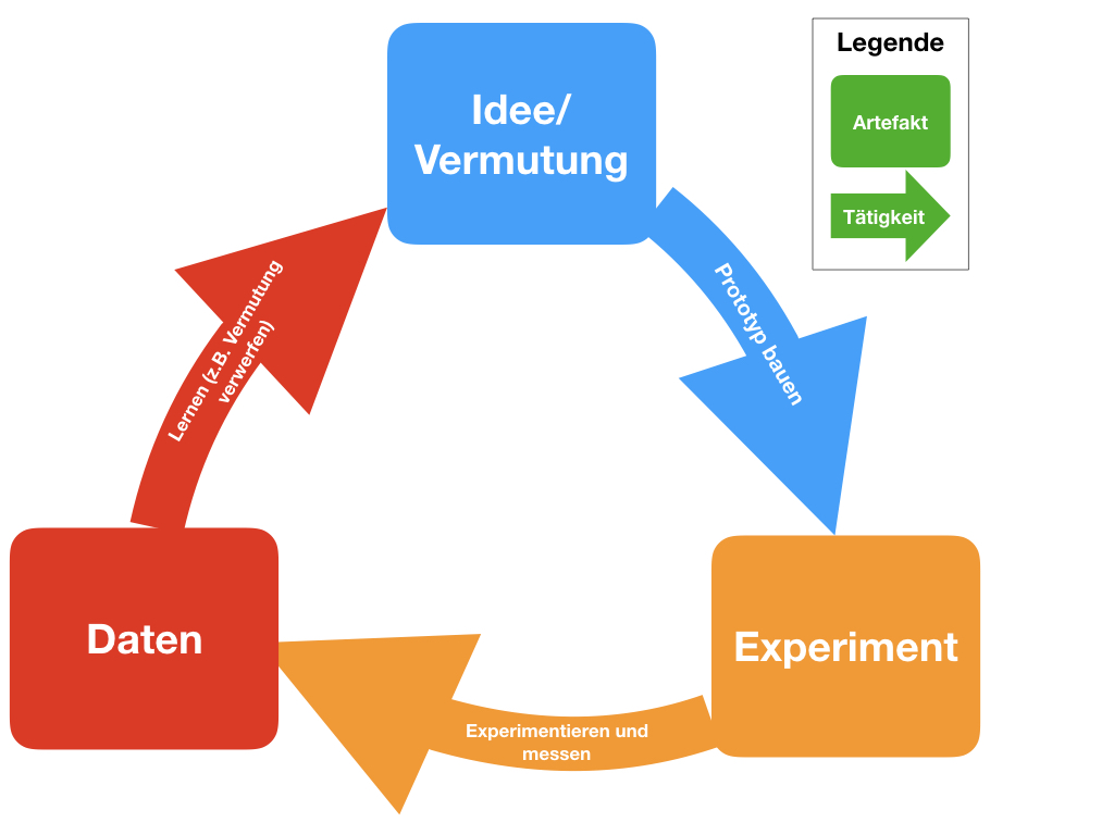 Grafik erklärt die drei Schritte der empirischen Prozesskontrolle in Lean Startup und auch in Scrum. Dabei gibt es drei Artefakte und drei Tätigkeiten.